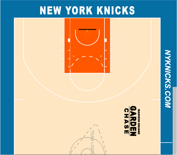 ニックスホームコート配色